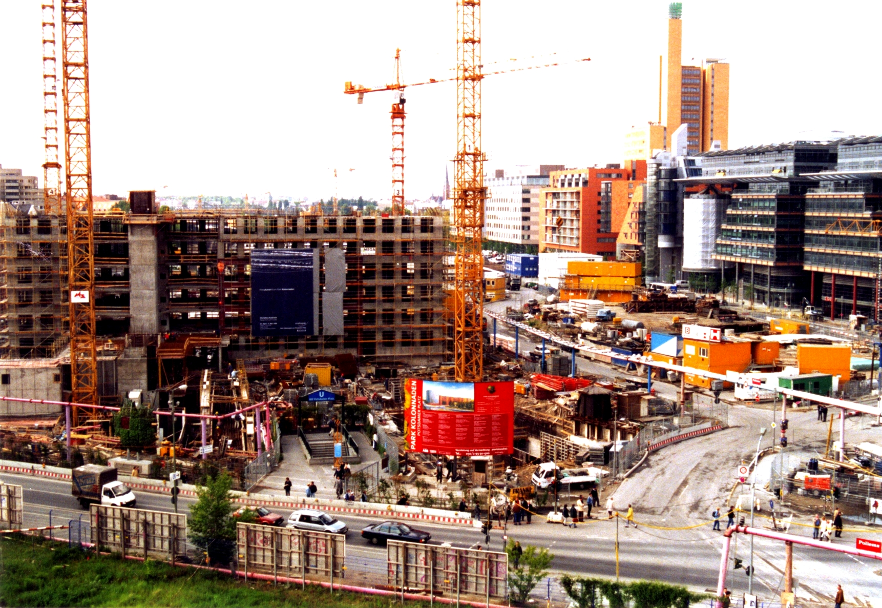 Baustelle Potsdamer Platz, Blick Richtung Süden, 2001